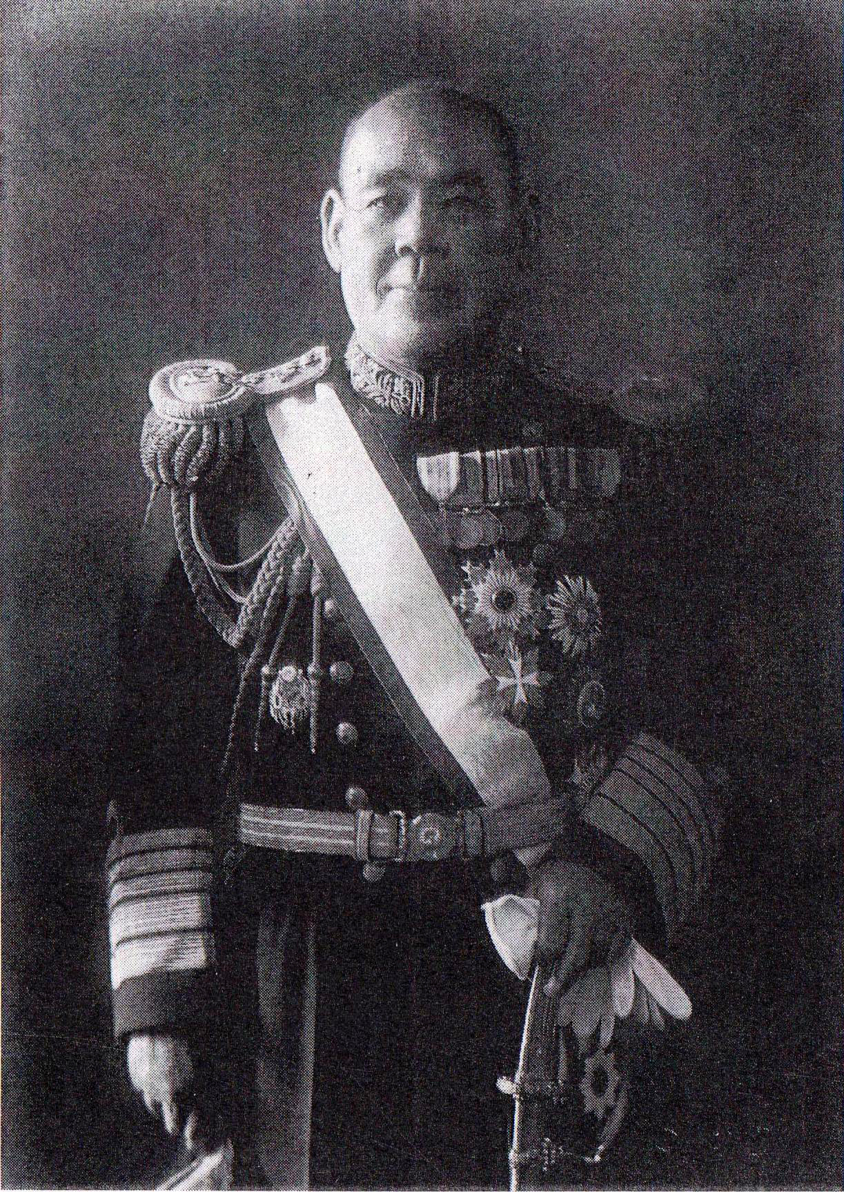 OSAMI NAGANO（永野修身）